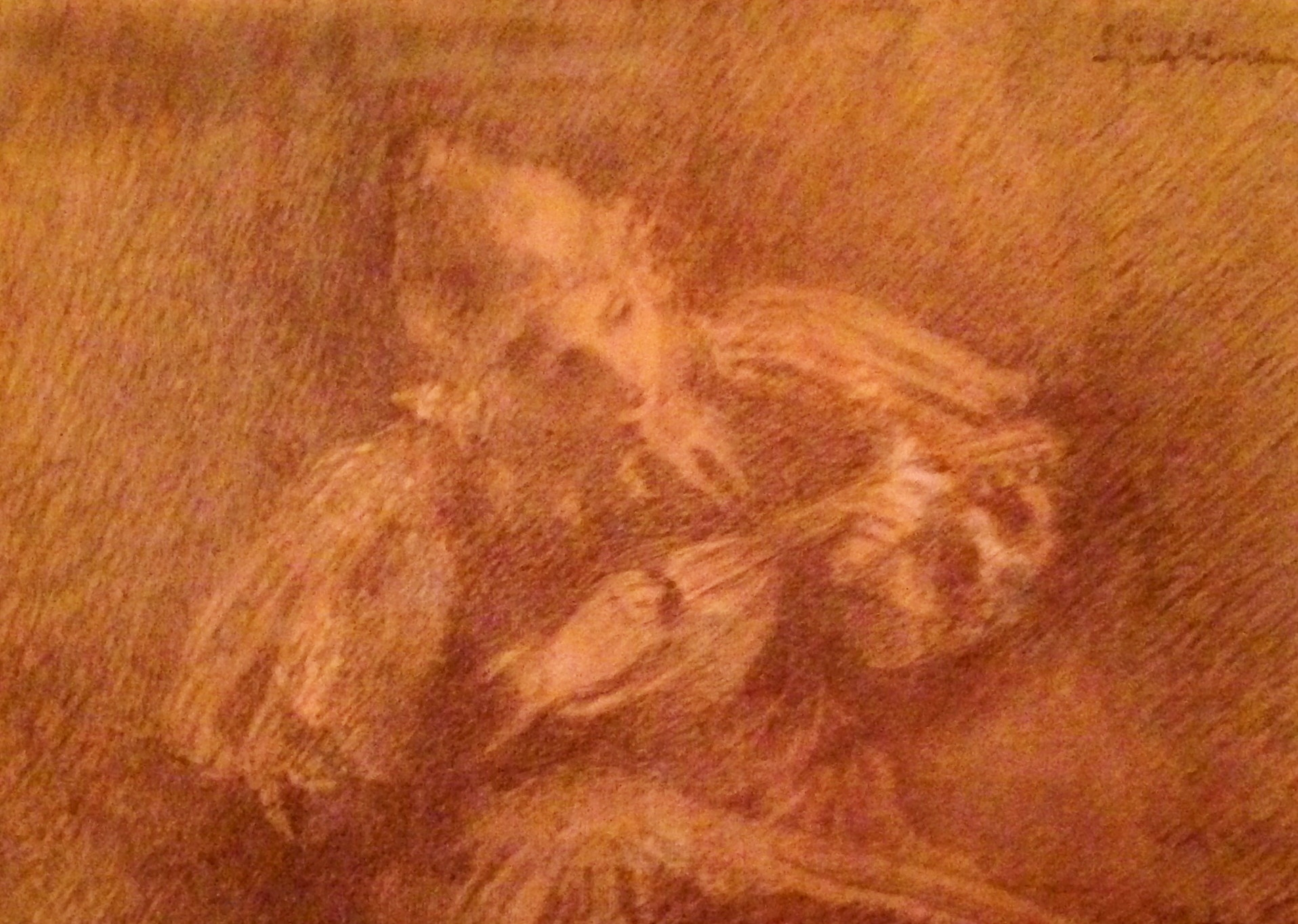 "Ljuvling" (Eja) av Johan Axel Gustaf Acke